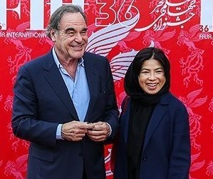 اختتامیه سی‌وششمین جشنواره جهانی فیلم فجر